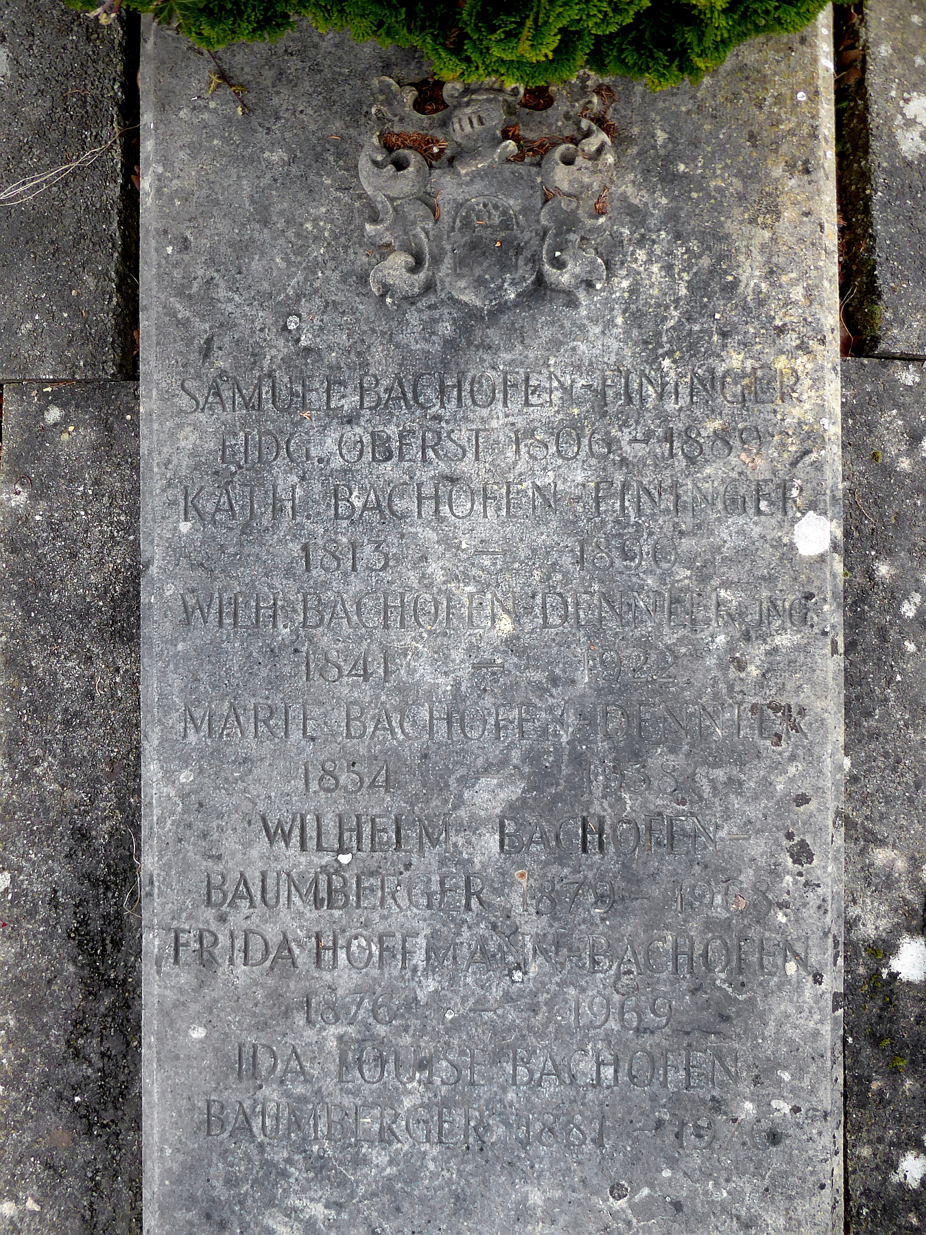 Wilhelm Bachofen-Dennler (1841–1922) Ingenieur, Unternehmer, Baufirma W. Bachofen-Dennler, Politiker, Familiengrab auf dem Friedhof Hörnli, Riehen, Basel-Stadt